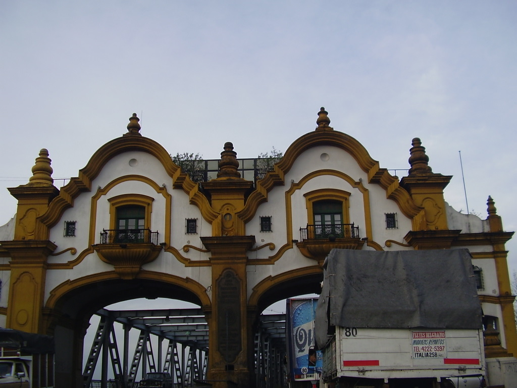 Puente Alsina, en el barrio porteño de Nueva Pompeya. Del otro lado del Riachuelo, en Avellaneda, está ubicada la terminal del Ferrocarril General Belgrano Sur